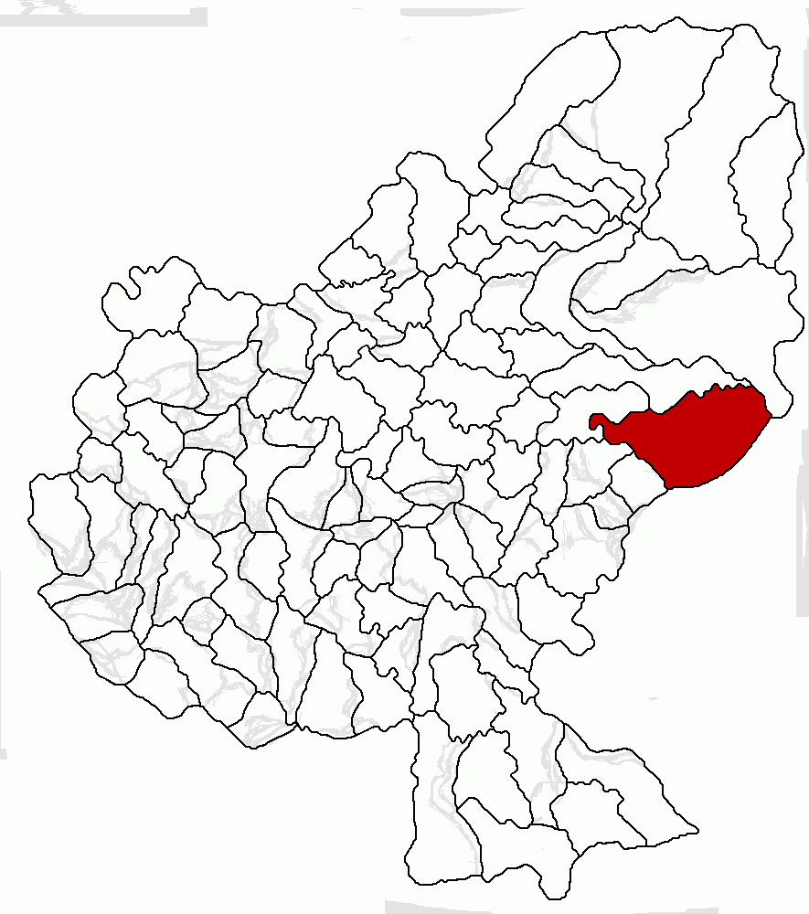 Categorie:Hărţi ale judeţului Mureş